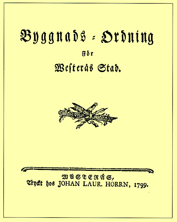 "Byggnads - Ordning" för Westerås Stad, sida 1